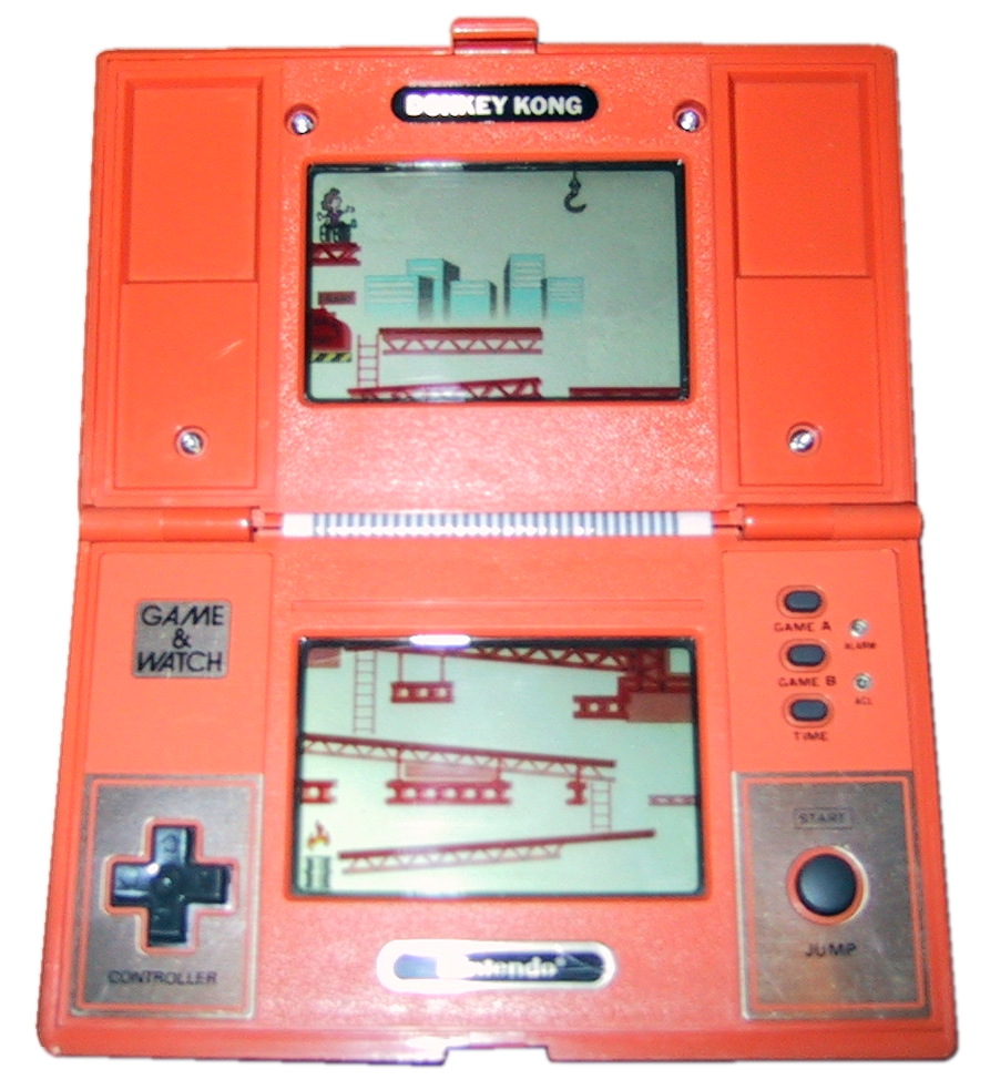 Transparent version of Image:Gw donkeykong.PNG.